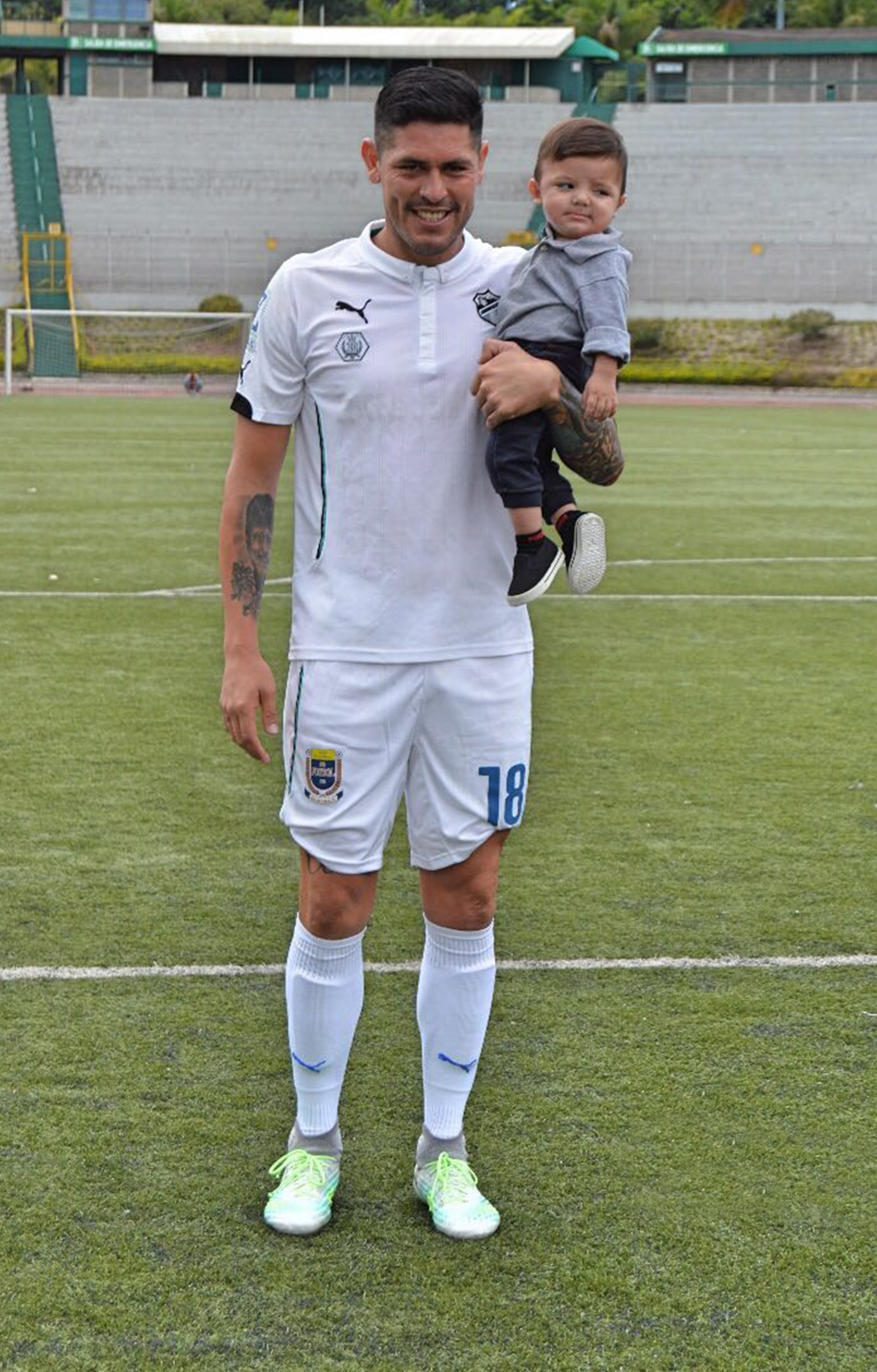 Paulo Centurión en Comunicaciones FC, posando junto a su hijo.